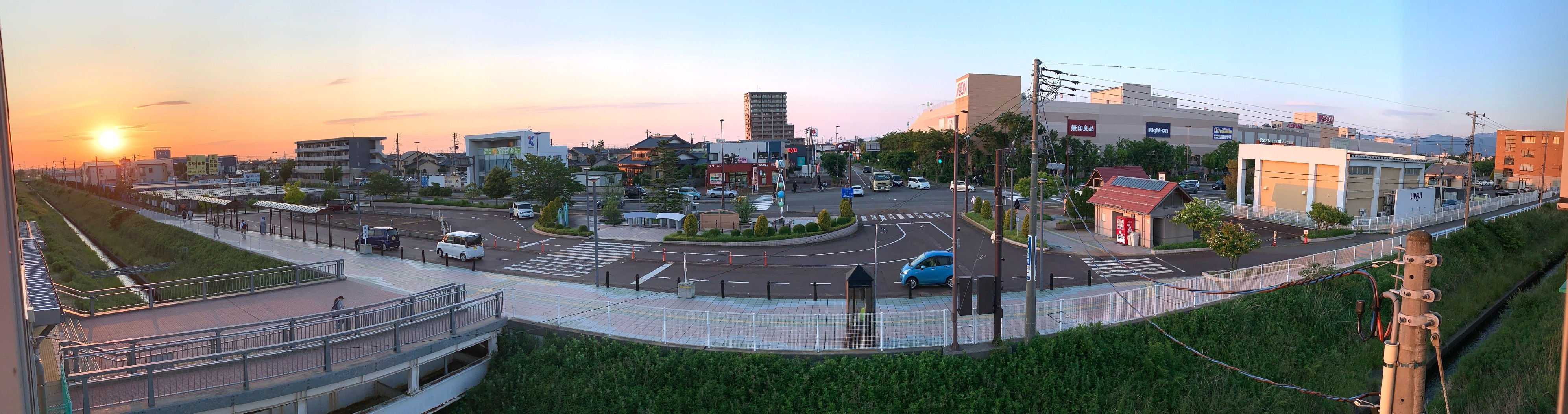 白新線西新発田駅の北口駅前（2020年5月）新発田南バイパス沿いにイオンモール新発田や住宅街が広がる。